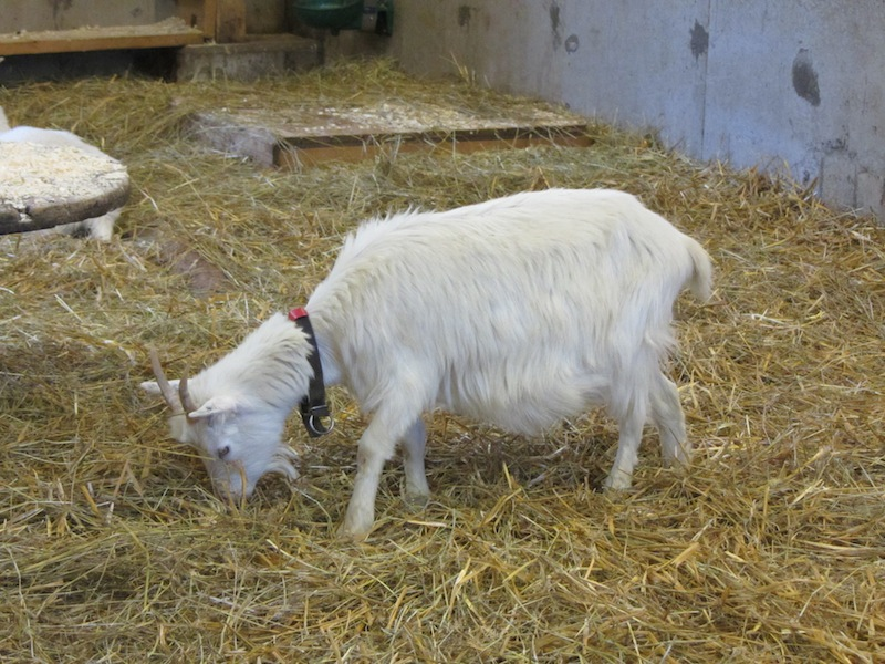 Lappget (en akut utrotningshotad getras).